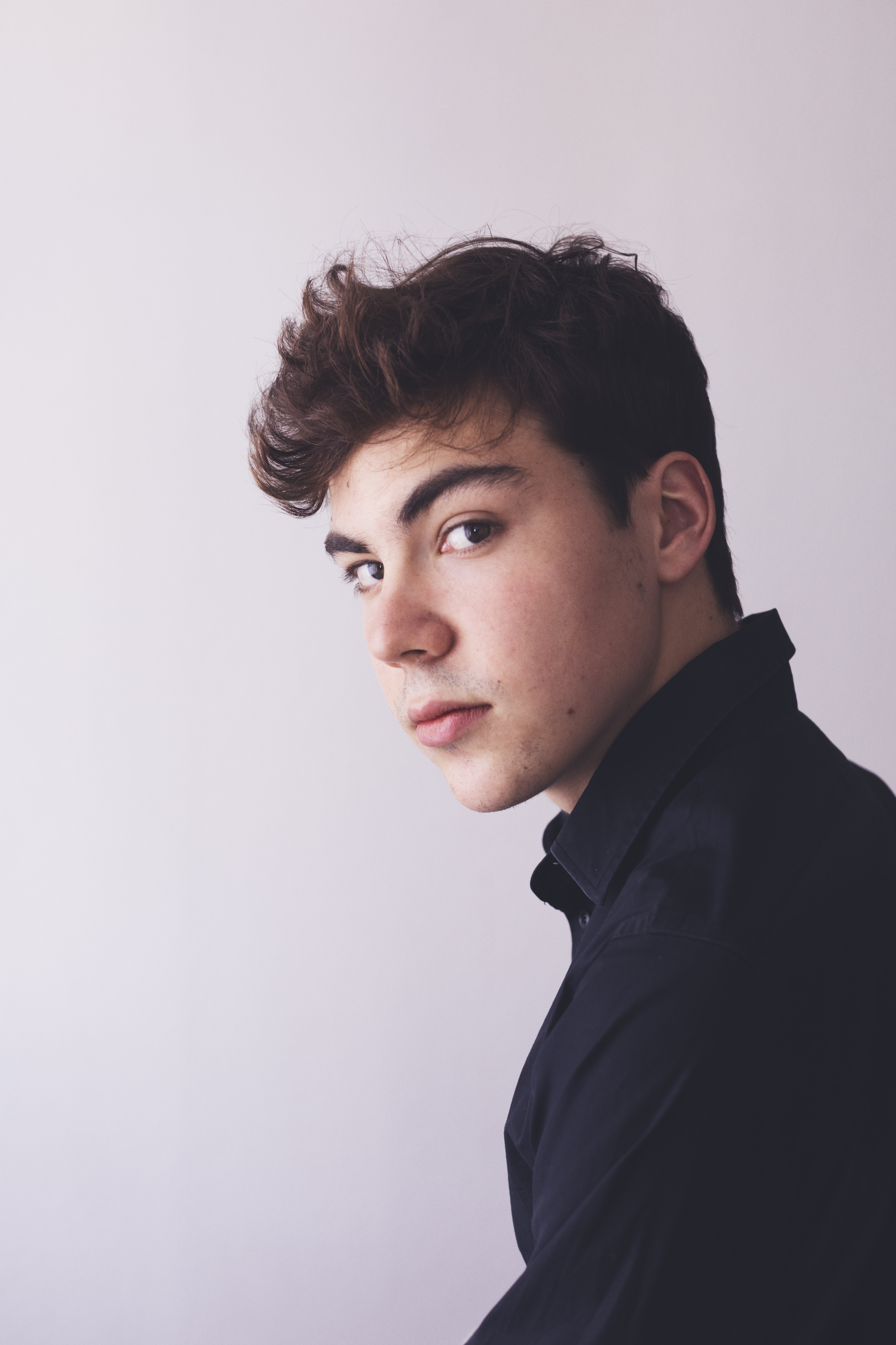 Aron Boks, Berlin 2018